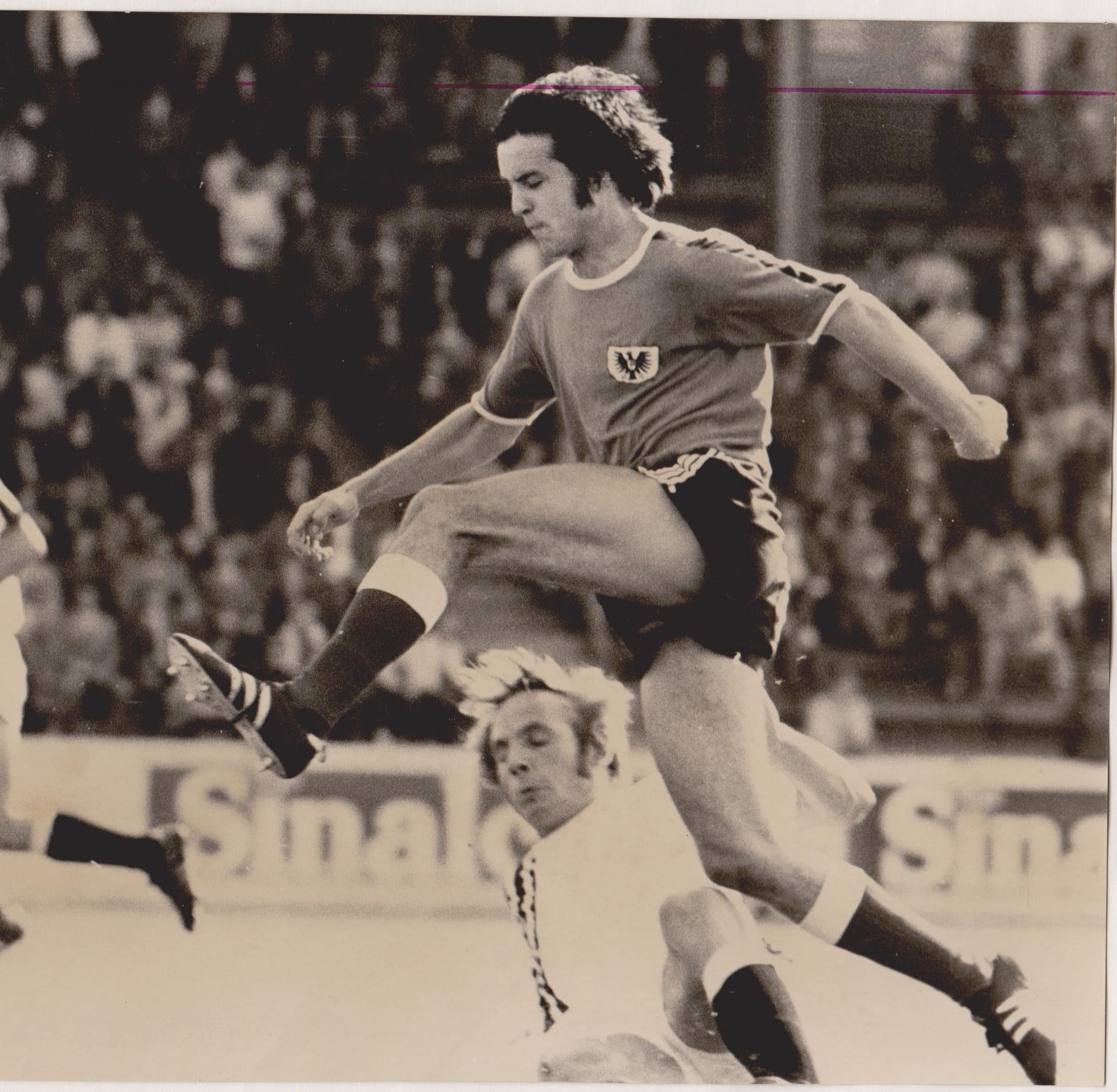 Dieter Stosberg im Trikot von Preußen Münster